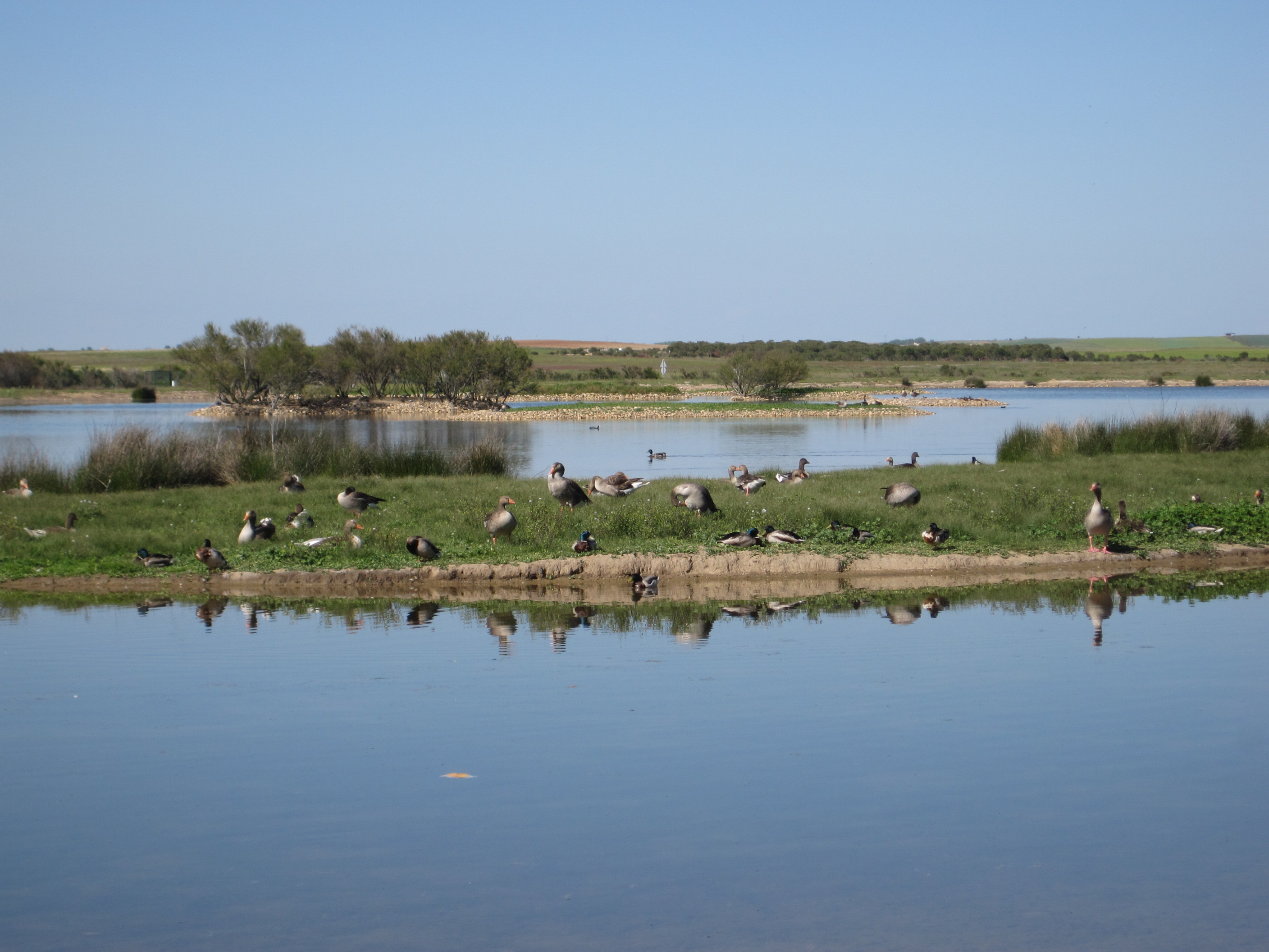 Diversas especies de aves en una de las charcas de las Lagunas de Villafáfila (Zamora, España).